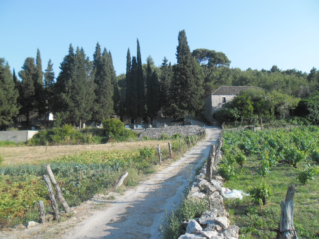 Sotnica, Babino Polje, Mljet